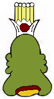 Escudo del municipio de Yautepec, Morelos.